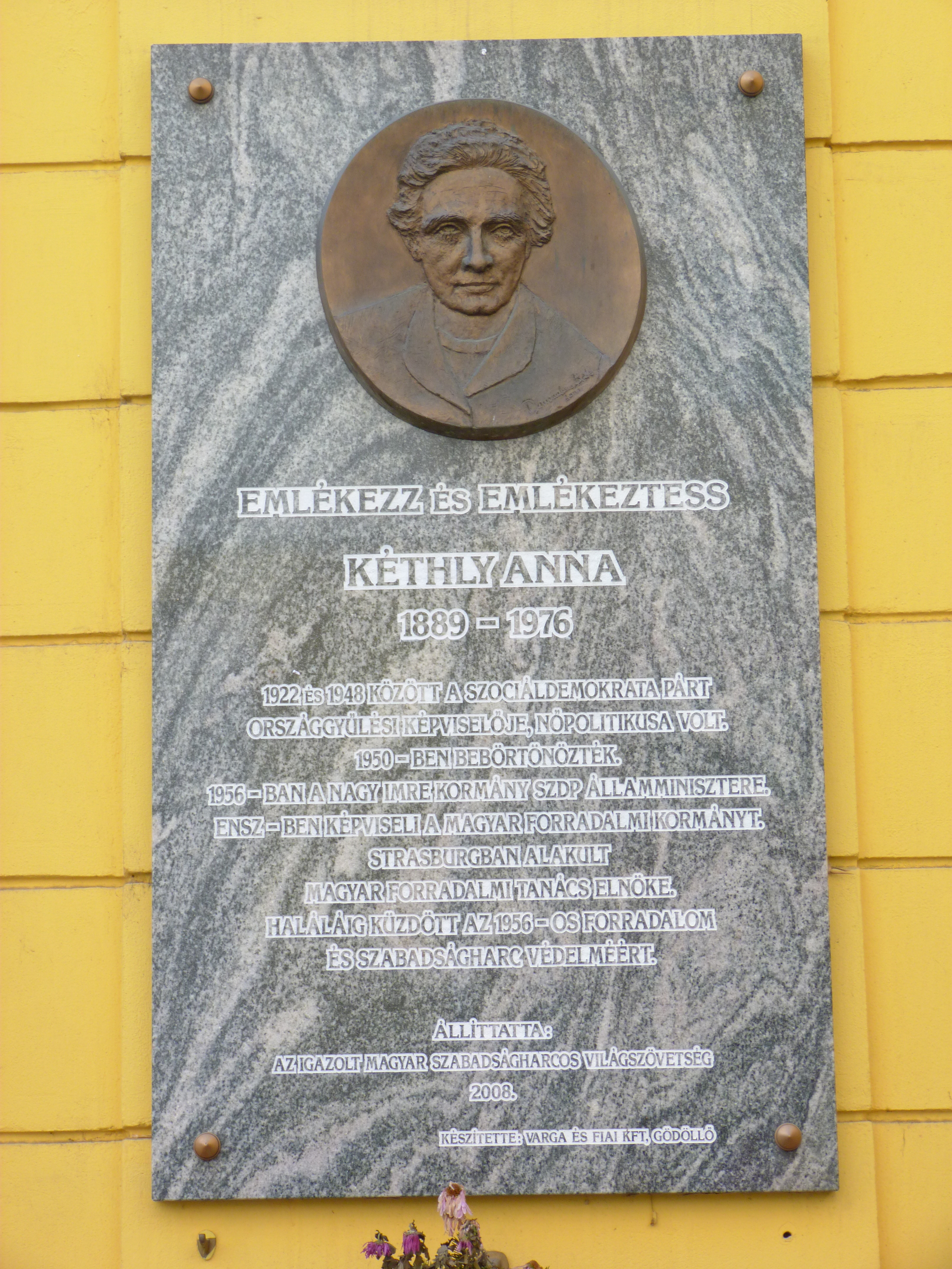 A felvétel 2012. december 5 -én készült Budapesten, a Józsefvárosban. Corvin köz. ©© Published under Creative Commons in the Metapolisz DVD line. All of the photos and vids in the Metapolisz DVD line are under Creative Commons and can be used even for commercial – for profit – purposes. Recommended Citation Derzsi Elekes Andor: Metapolisz DVD line ©© Megjelent Creative Commons alatt a Metapolisz sorozatban. A Metapolisz sorozat valamennyi képe és filmje Creative Commons alatti valamint kereskedelmi - for profit - célra is felhasználható. Ajánlott hivatkozás: Derzsi Elekes Andor: Metapolisz DVD line . Másik fénykép ugyanerről a tábláról: File:KethlyAnna Corvin1.jpg.